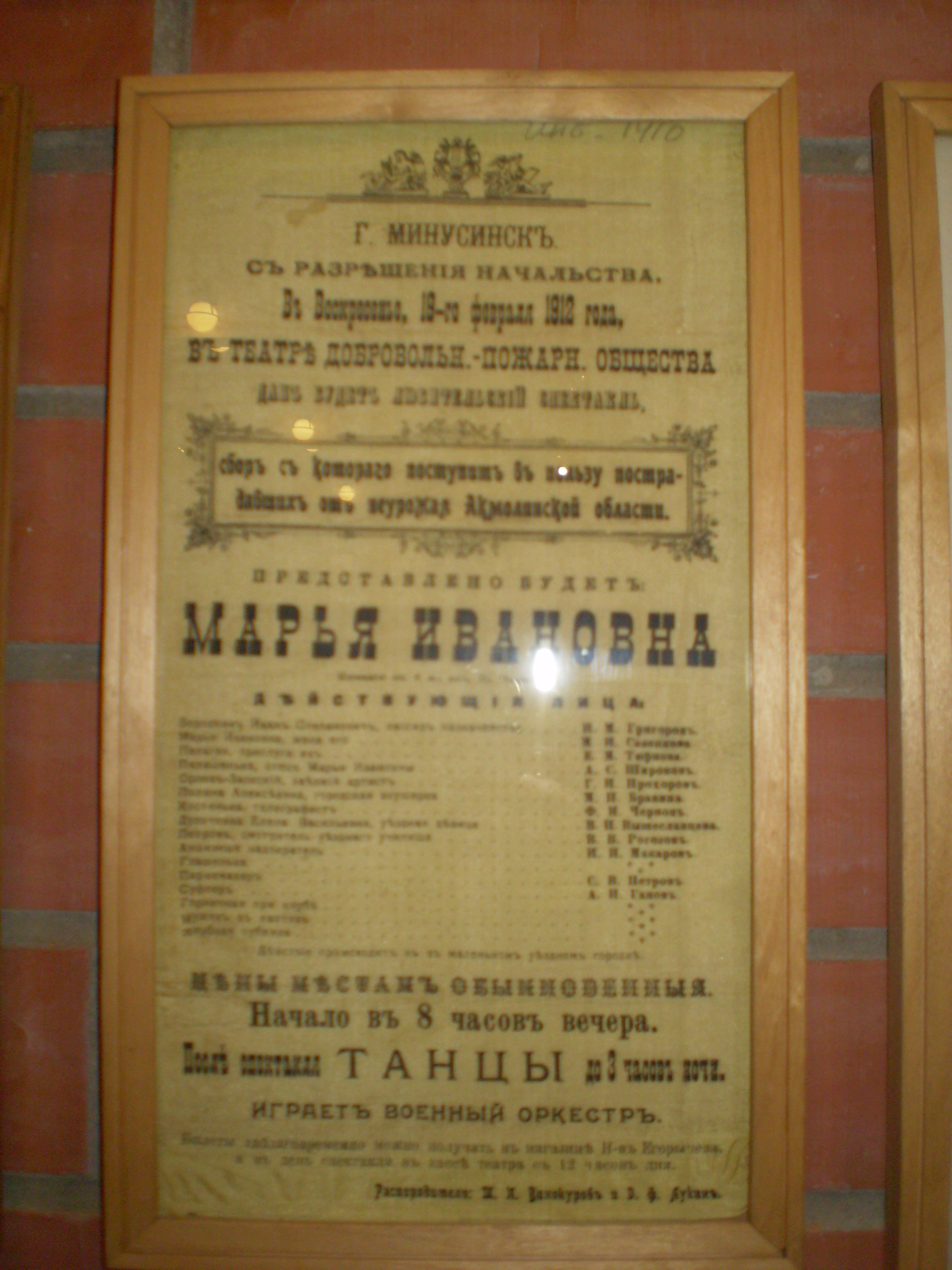 Театральная афиша. Город Минусинск, 1912 год.